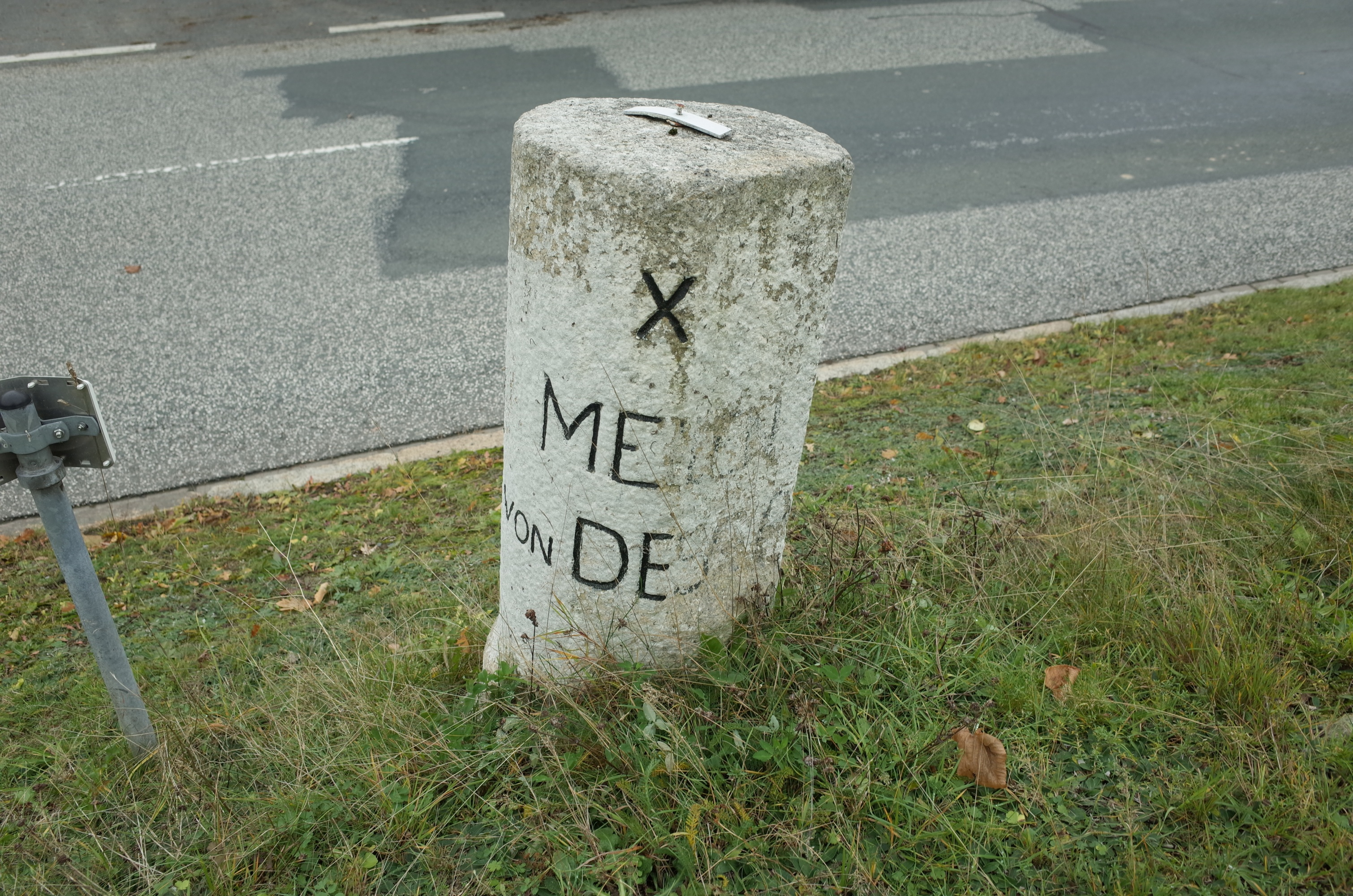 Harzgerode, Ortsteil Güntersberge, Distanzstein, Rundsockelstein (Anhaltischer Meilenstein) mit Angabe X MEILEN von DESSAU